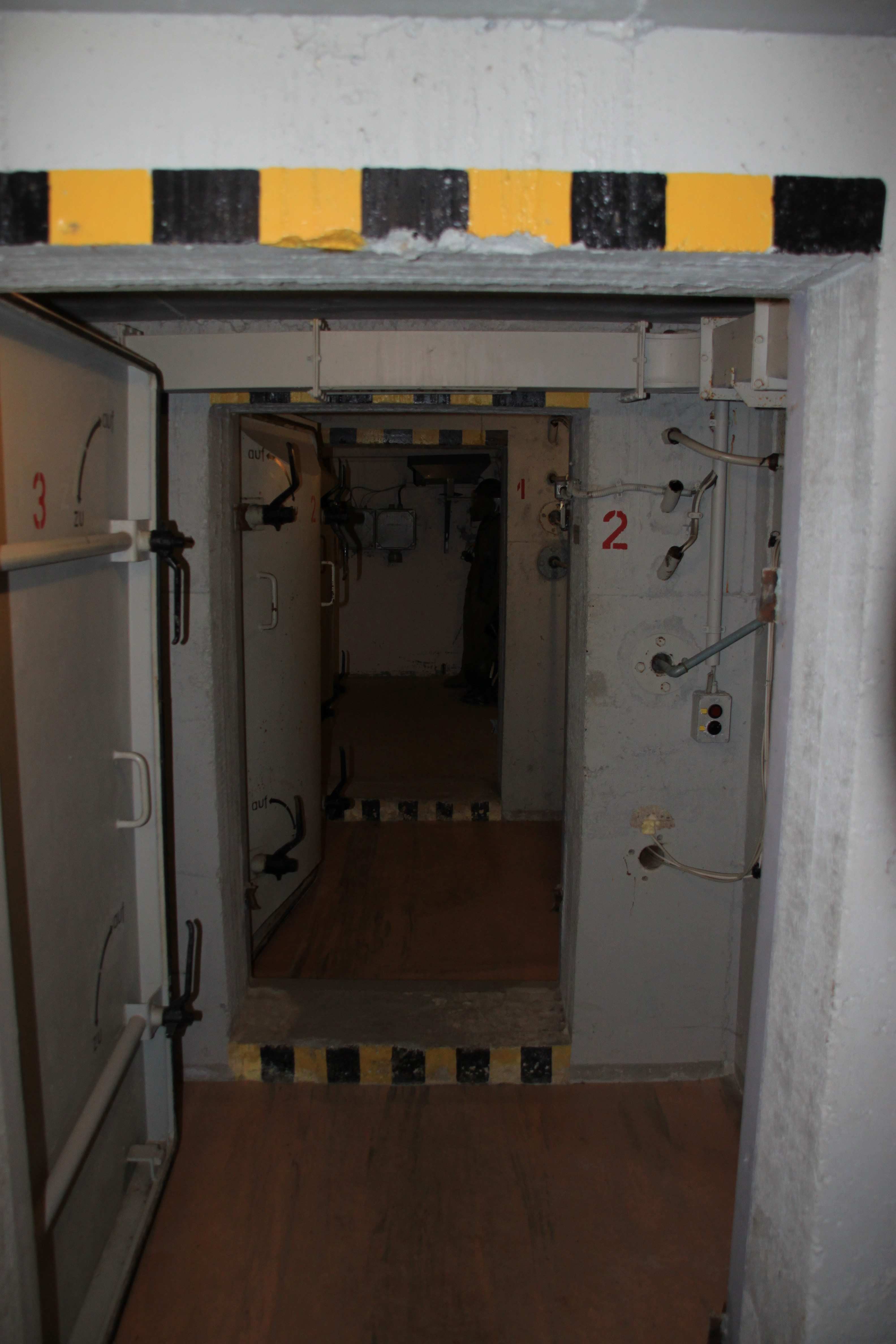 Eingangsbereich des Musemusbunkers in Kossa